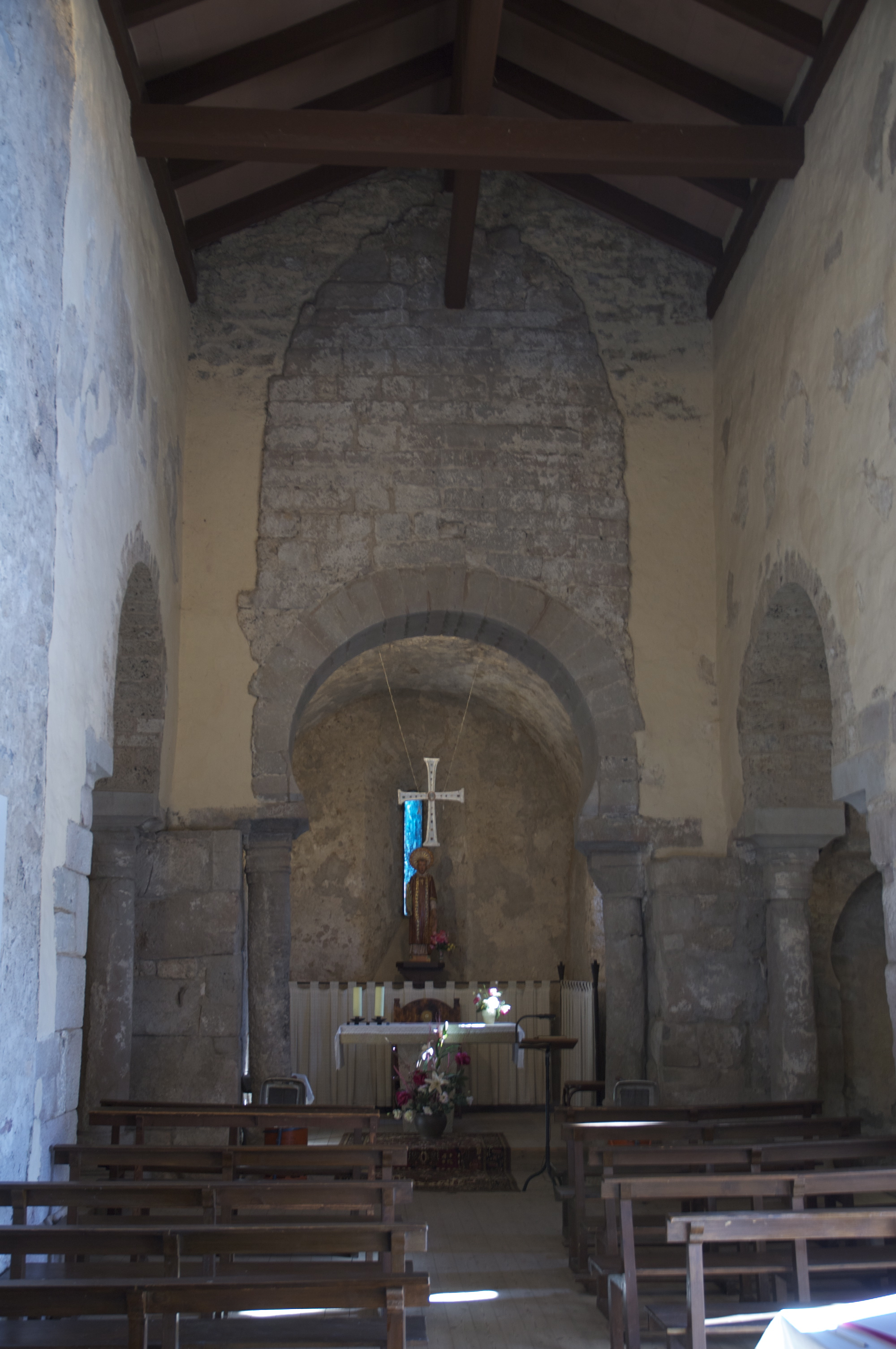 Vista de l'interior de l'església des dels peus de la nau.